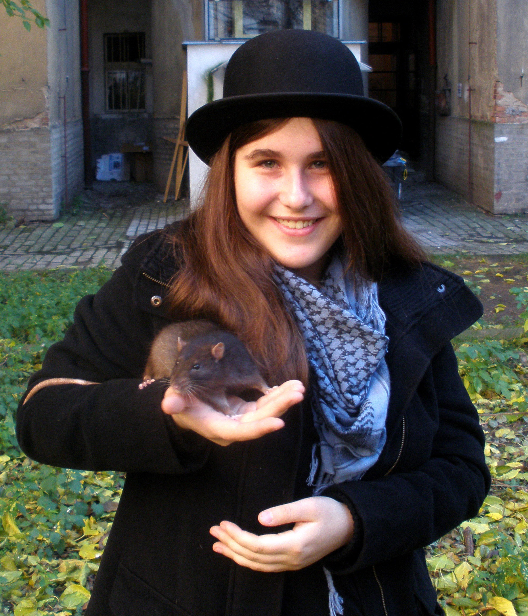 Agáta Kestřánková - česká spisovatelka, autorka knih Rytíři a jiná havěť, Tam za velkou louží hejno supů krouží a CD audipovídek Rytíři v louži